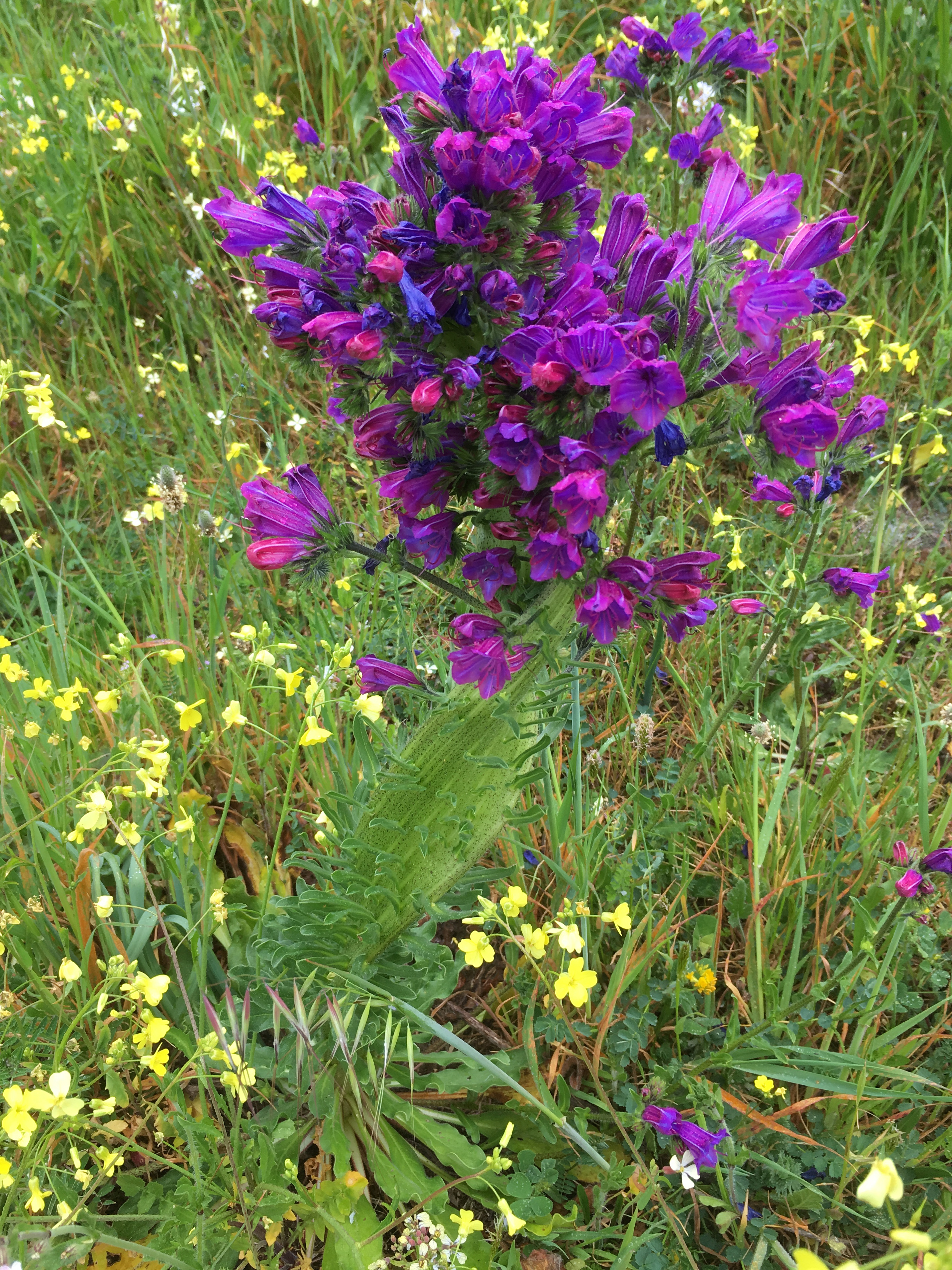 Phénomène de fasciation sur un Echium plantagineum dans un champ en Corse du Sud ; avril 2019.